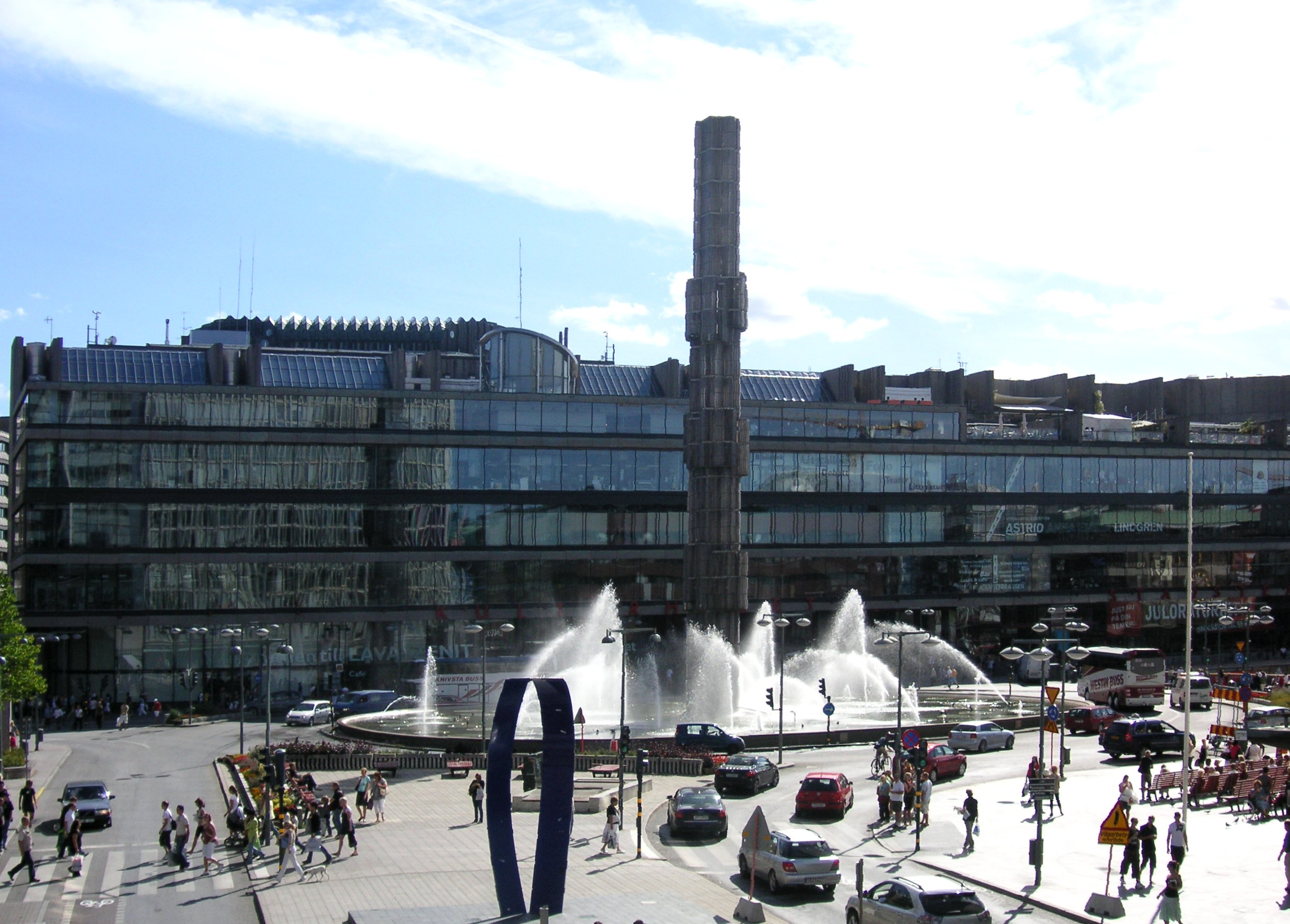 Stockholms Kulturhus sommaren 2007